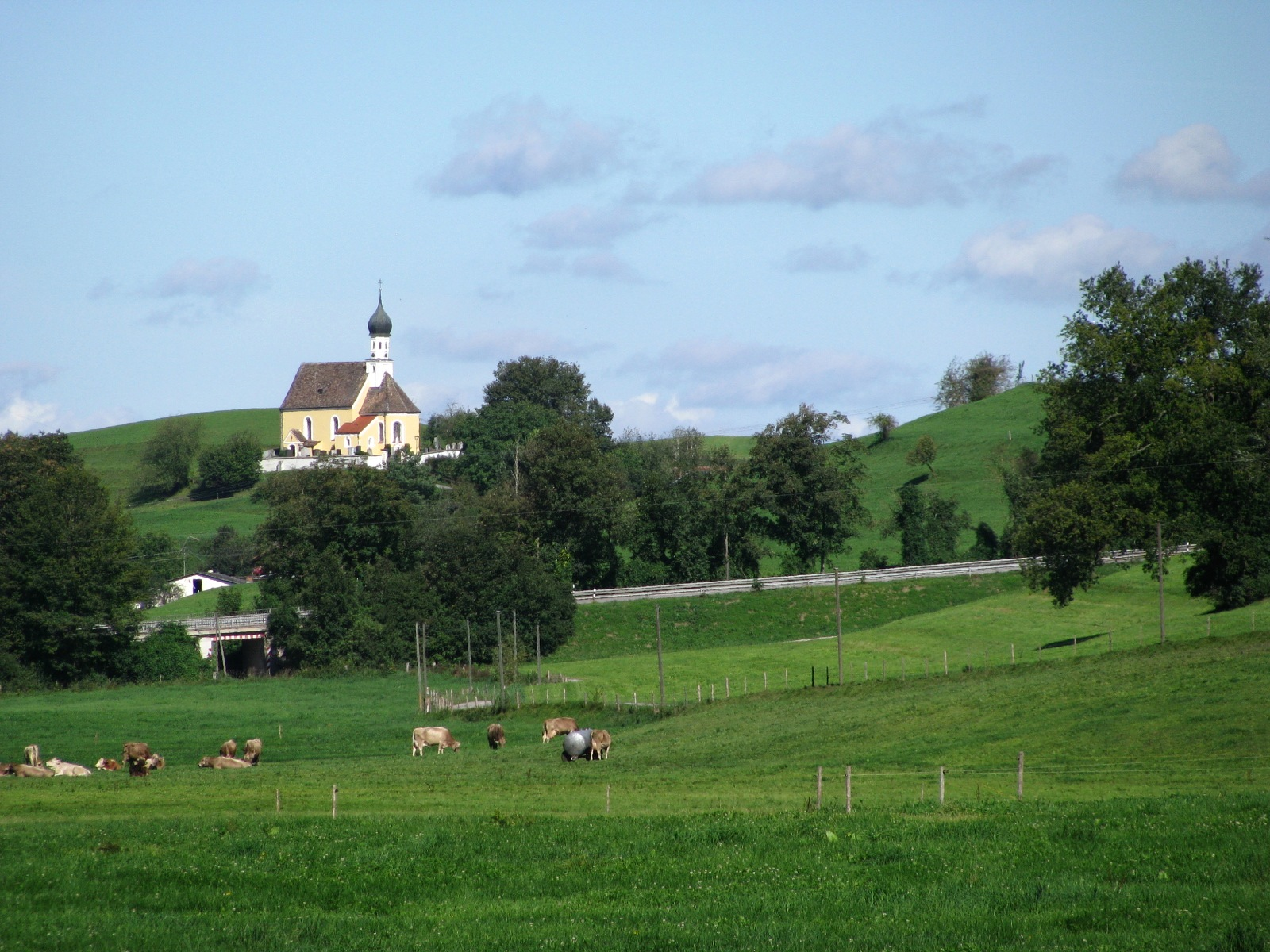 Filialkirche St. Mariä Himmelfahrt in Jenhausen vom Grünbachtal aus gesehen (aus Südosten)